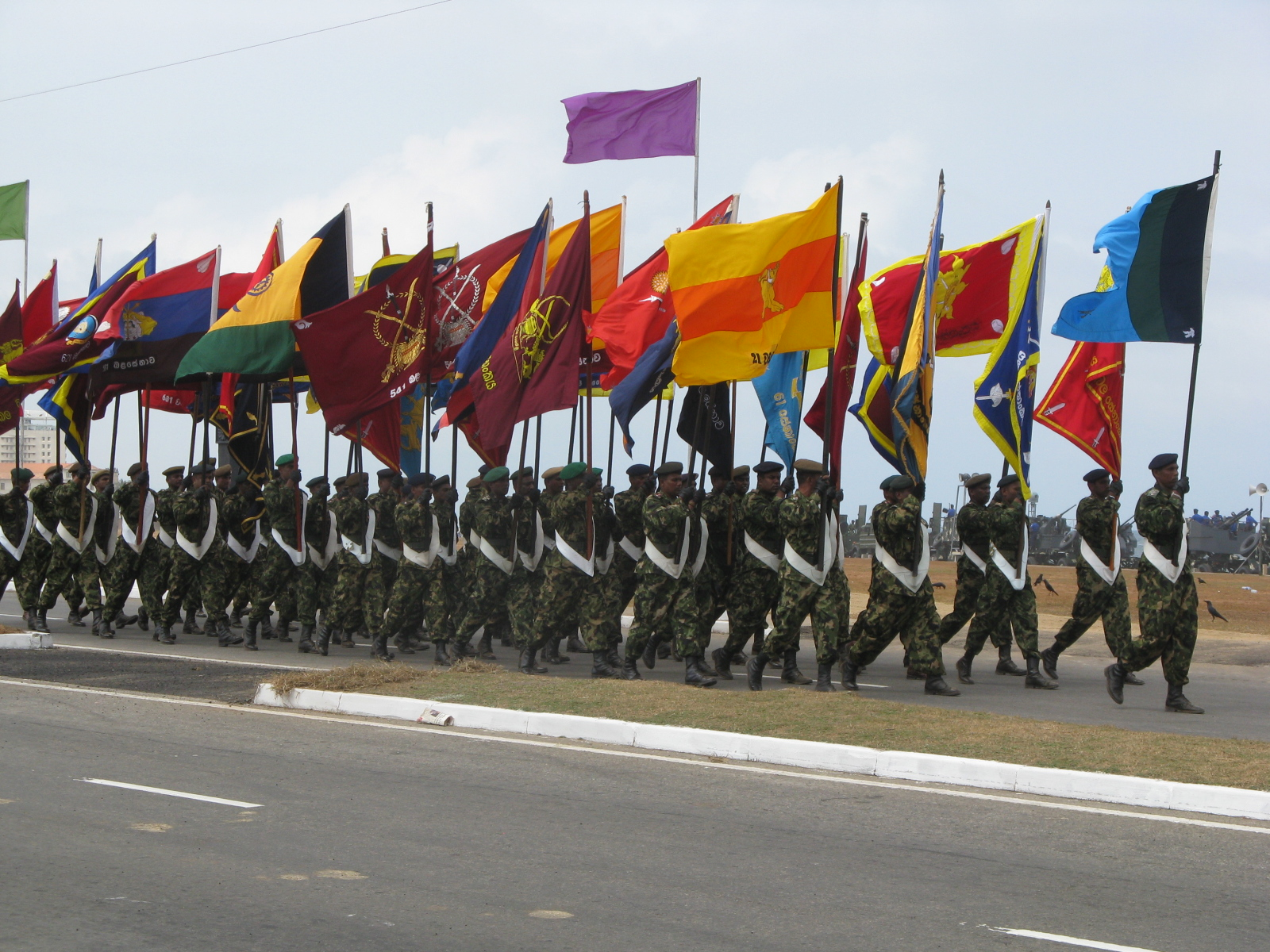 Sri Lanka Army